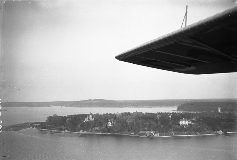 Blick auf Schwanenwerder in Wannsee bei Berlin